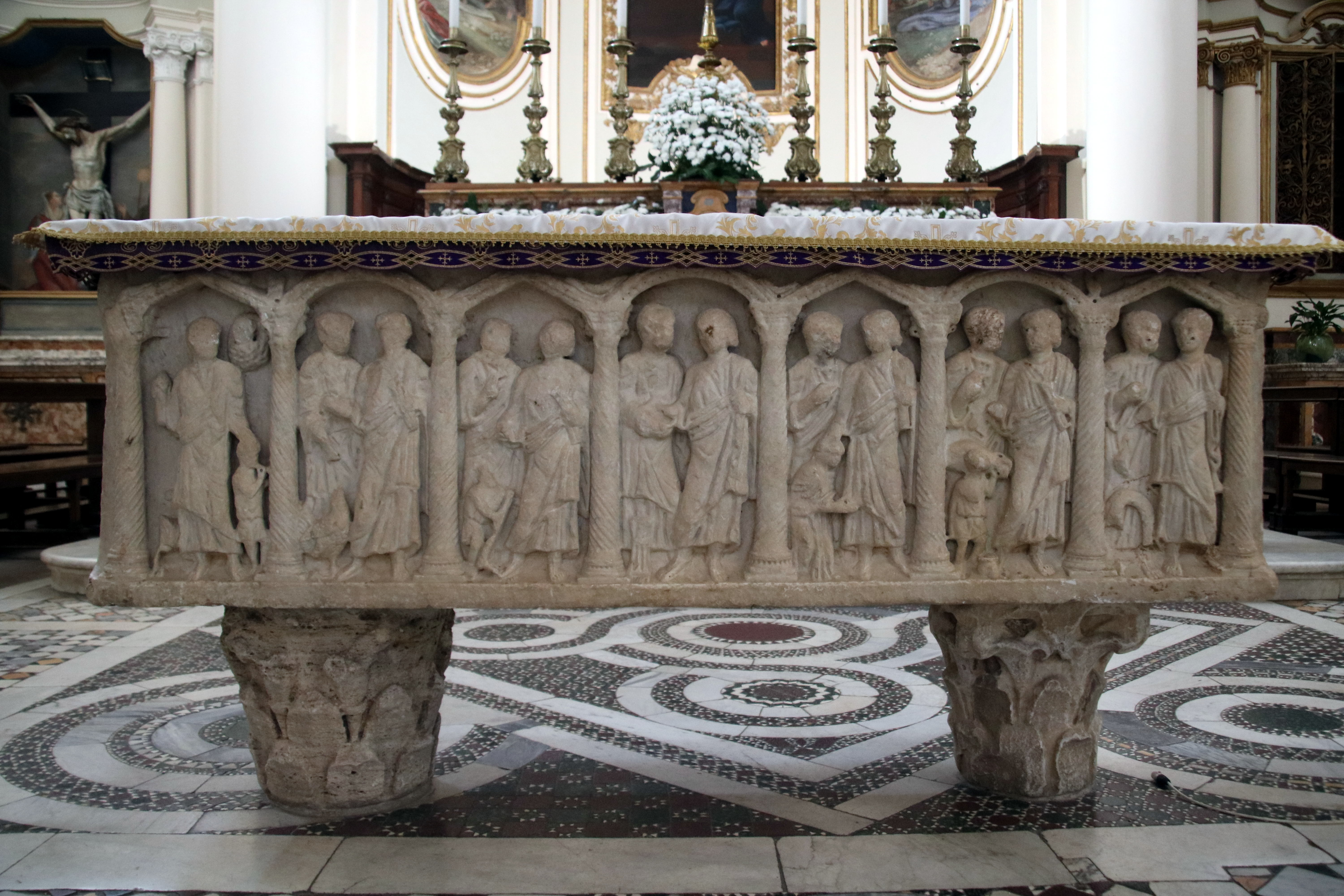 Cattedrale di Santa Maria Maggiore (Civita Castellana), sarcofago paleocristiano, iii-iv secolo